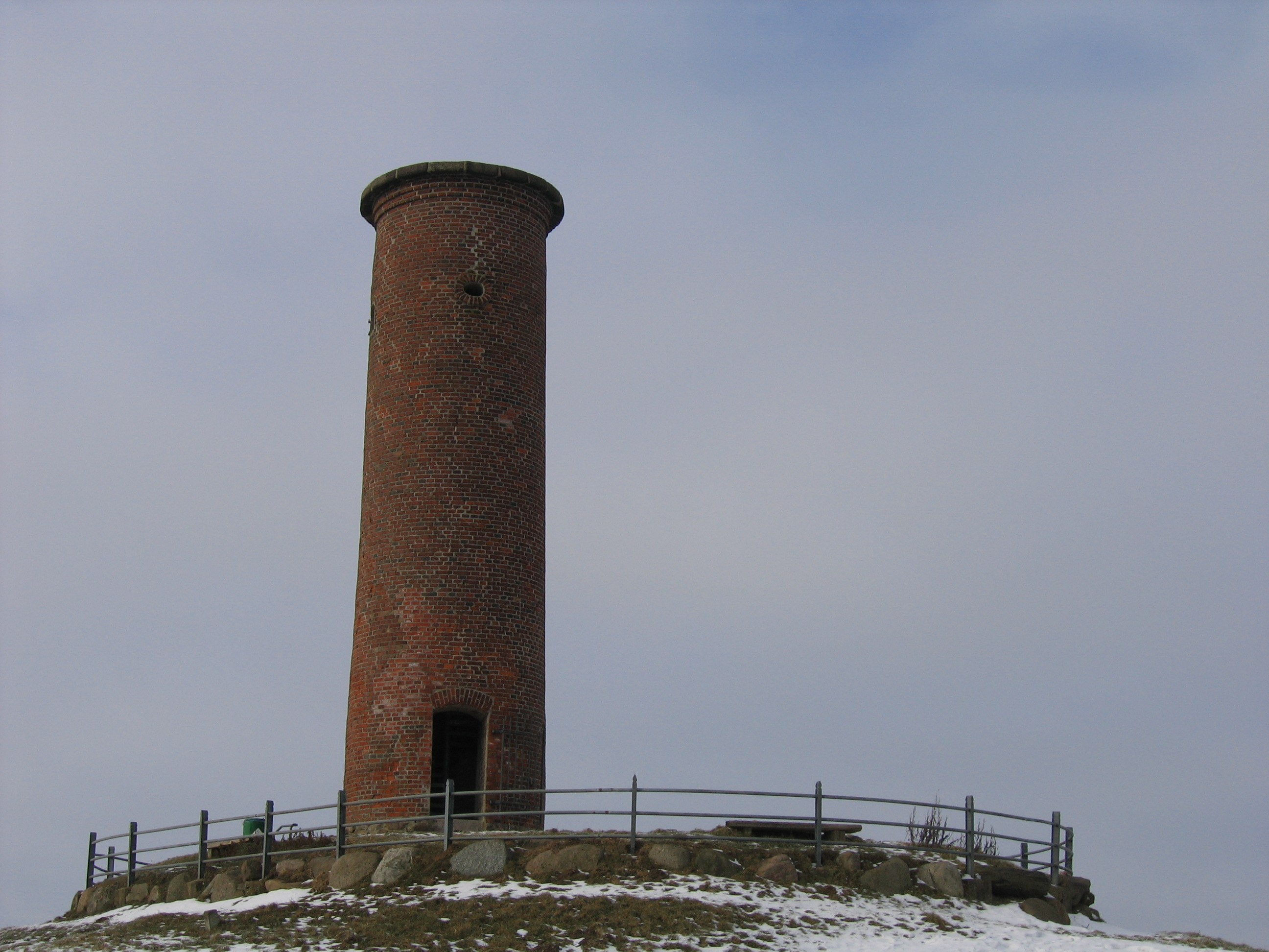 Gömnitzer Berg in Süsel, Turm auf dem Berg, öffentlich begehbar